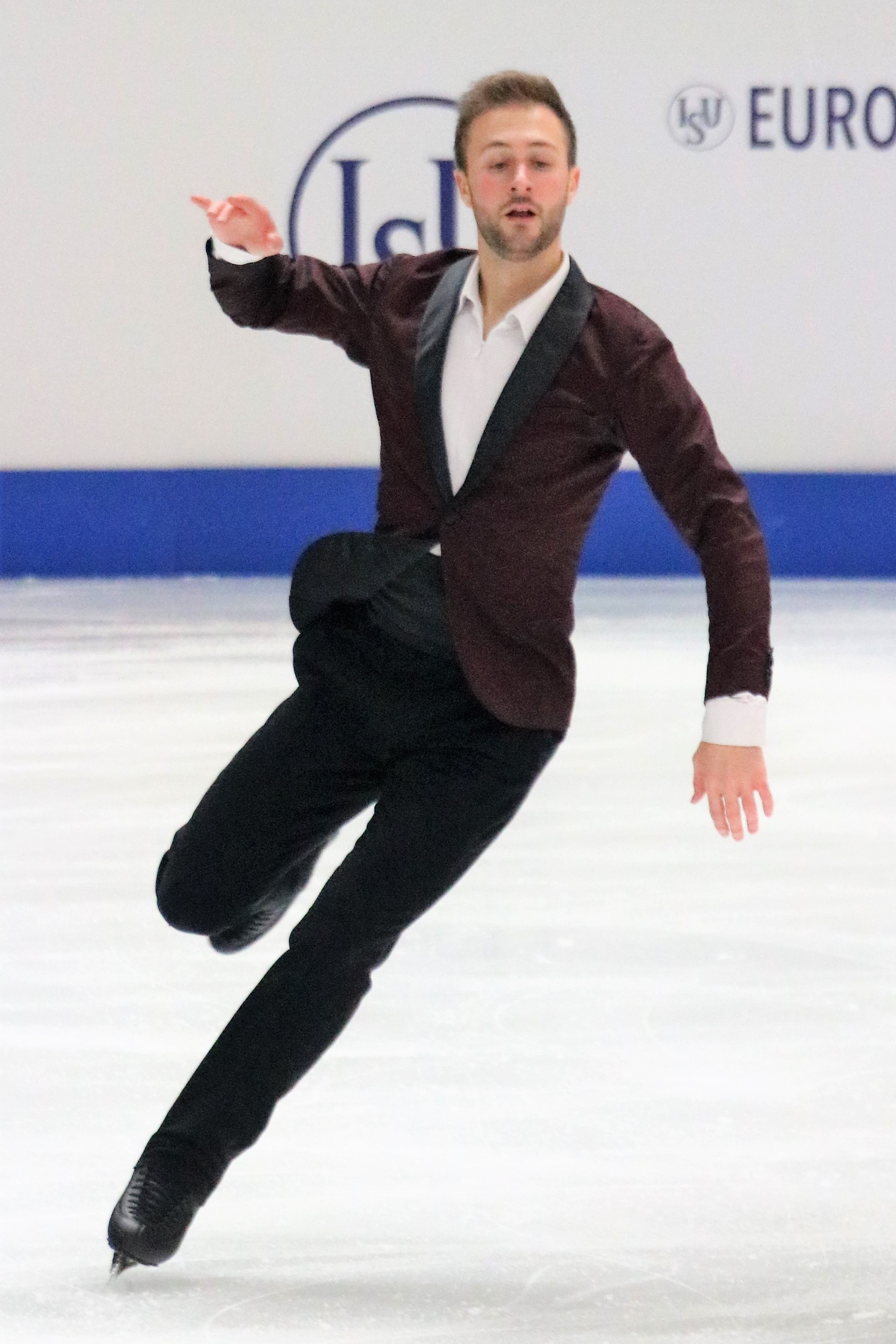 Дэвид Левтон Брейн (Монако) на чемпионате Европы по фигурному катанию 2020